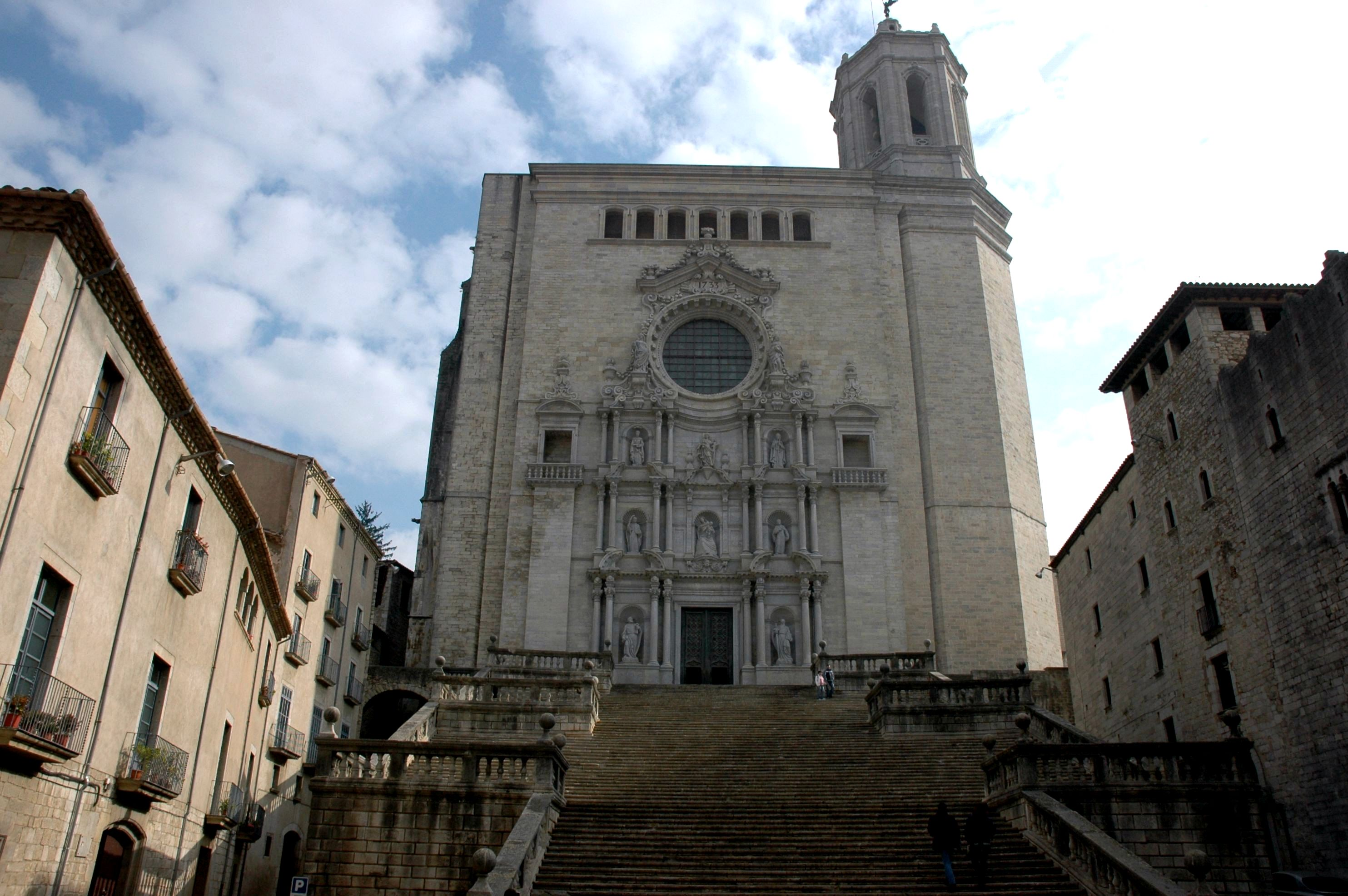 Catedral de Girona - Escalinates